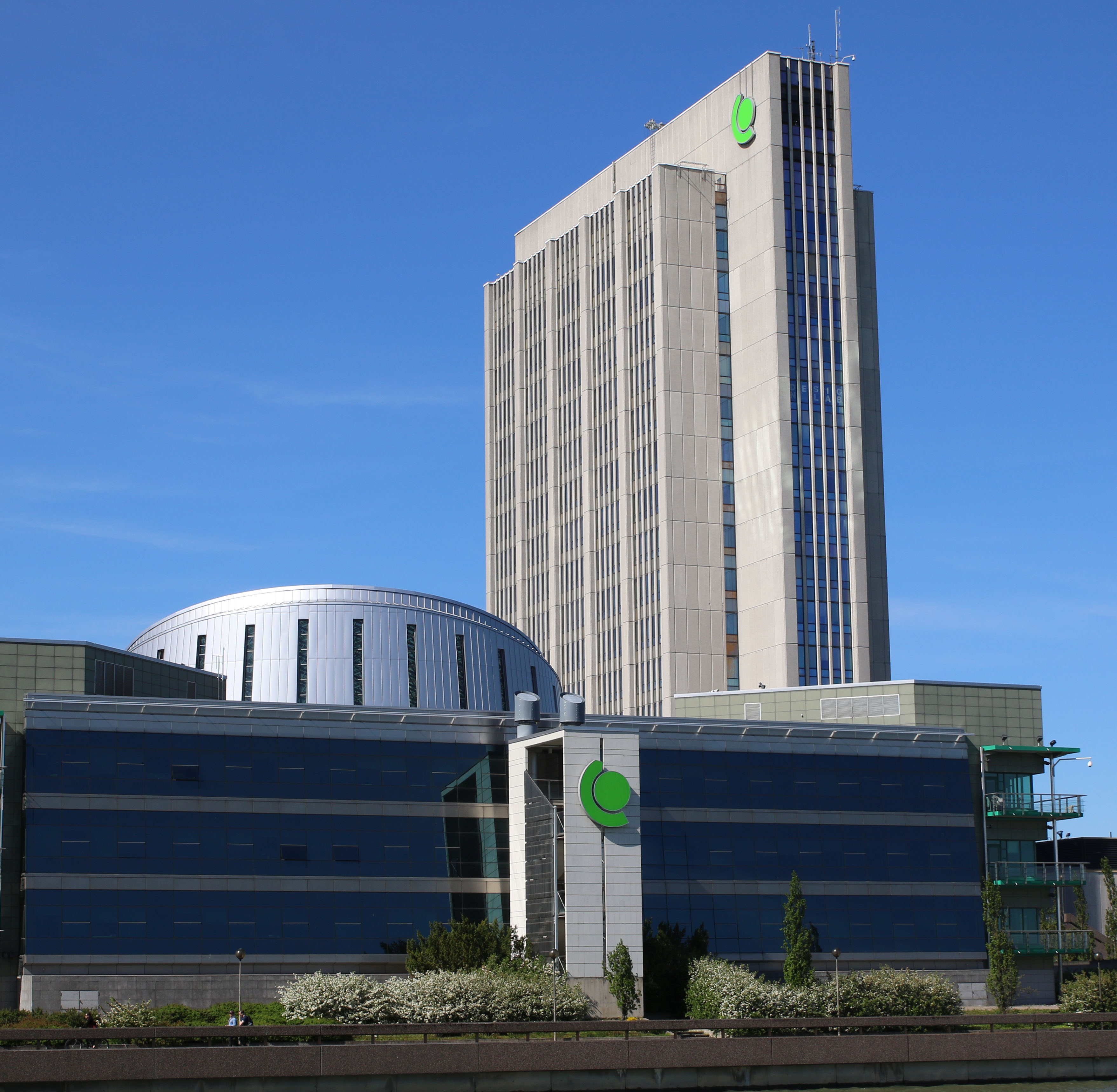 Fortumin pääkonttori Keilaniemessä kesällä 2017